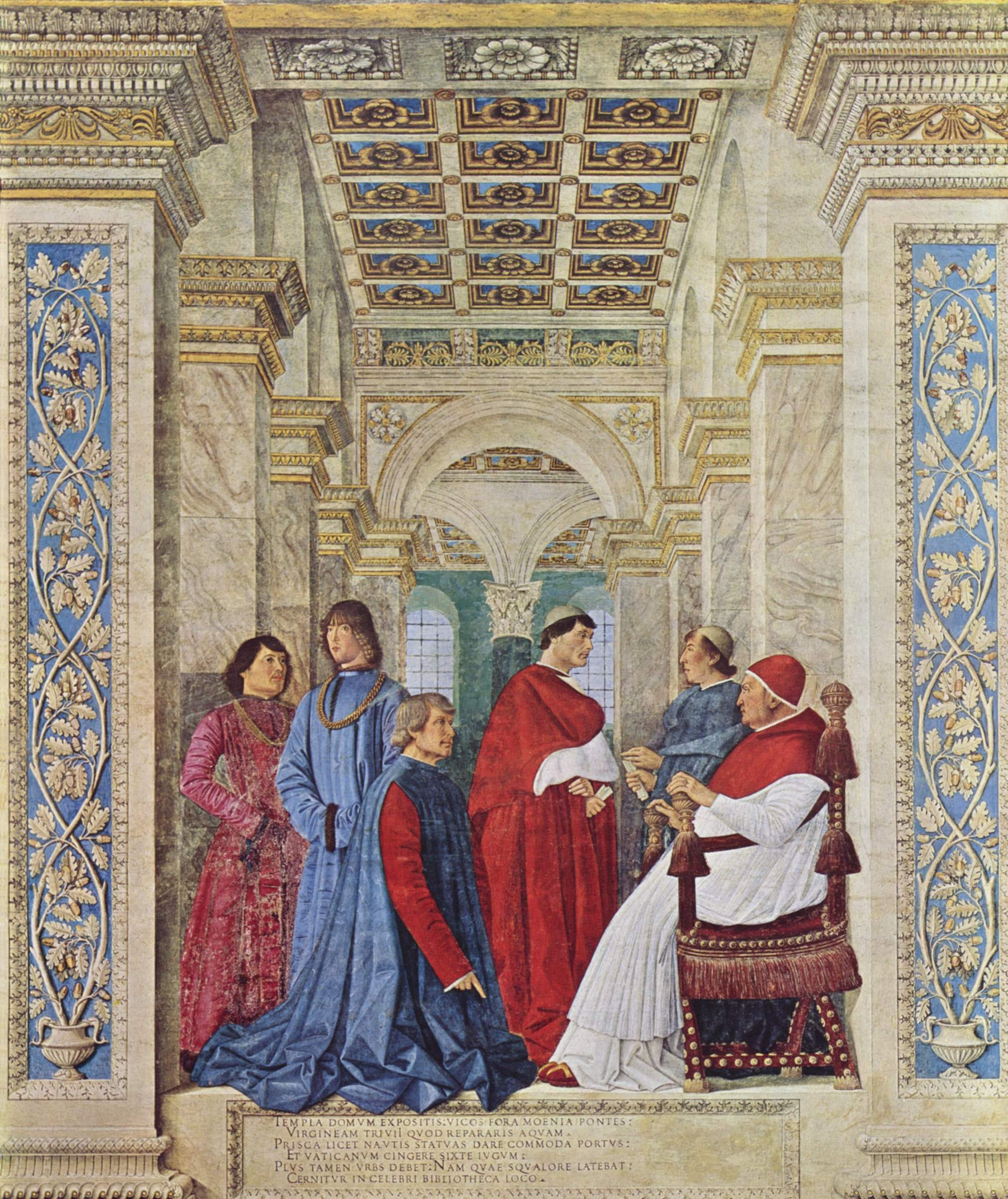 da sinistra, Giovanni della Rovere, Girolamo Riario, Bartolomeo Platina, later Julius II (Giuliano della Rovere), Raffaele Riario, tutti nipoti del papa, Sixtus IV